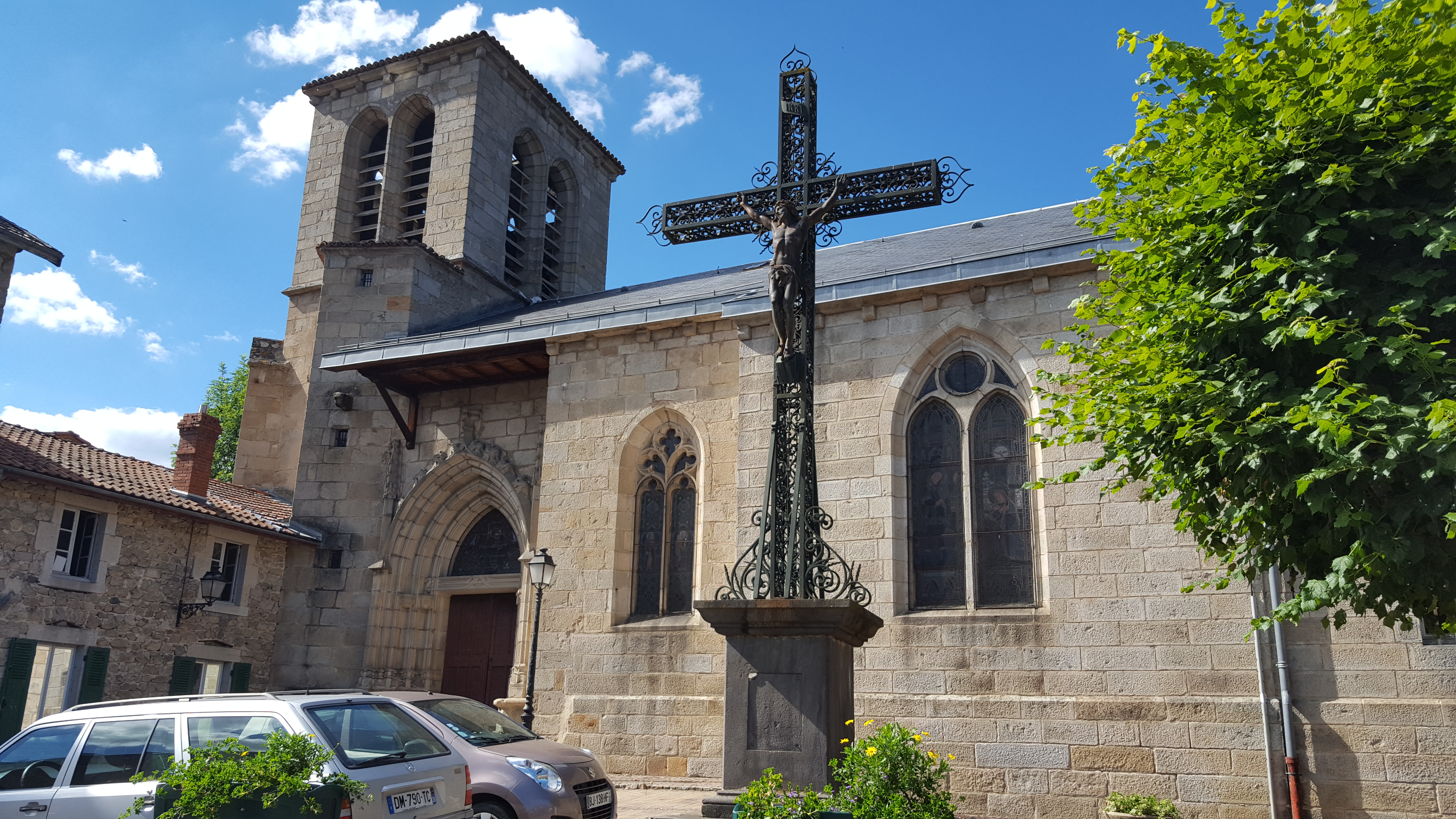 église du bourg de Vertolaye